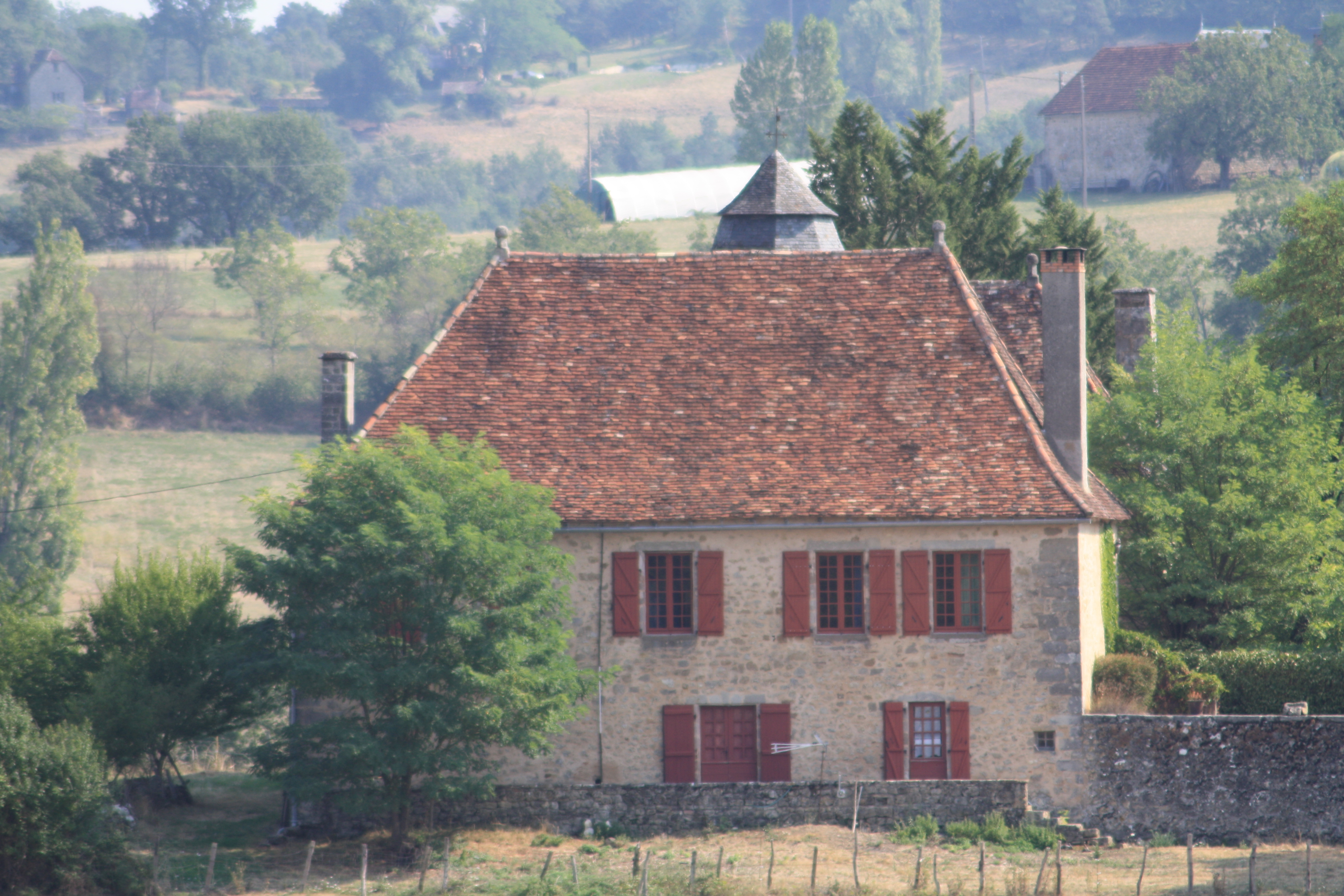 Manoir du Battut, (Inscrit, 1971), Côté Est .